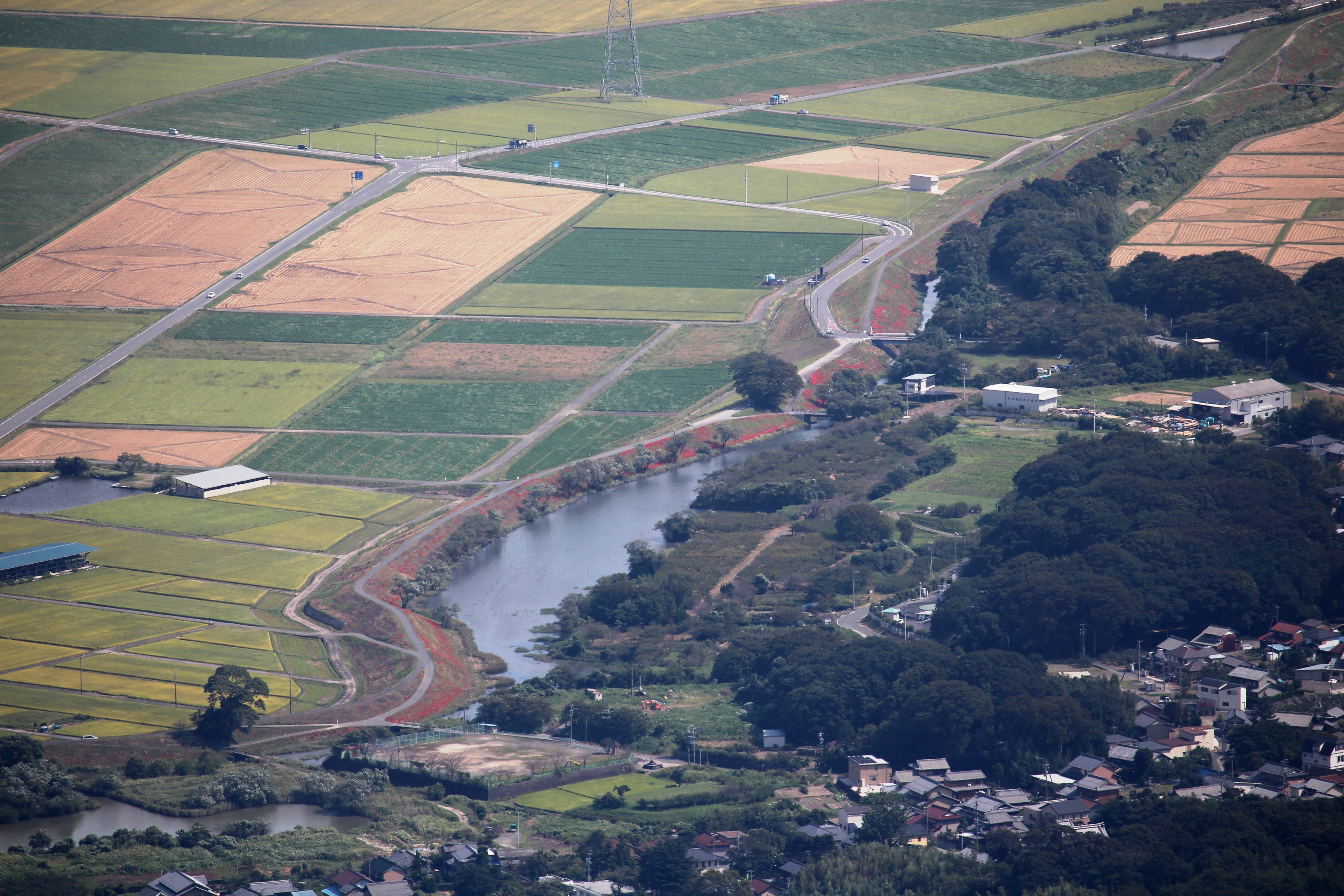 養老山から望む津屋川河川敷に咲くヒガンバナ（彼岸花、学名：Lycoris radiata (L'Hér.) Herb.）、岐阜県海津市